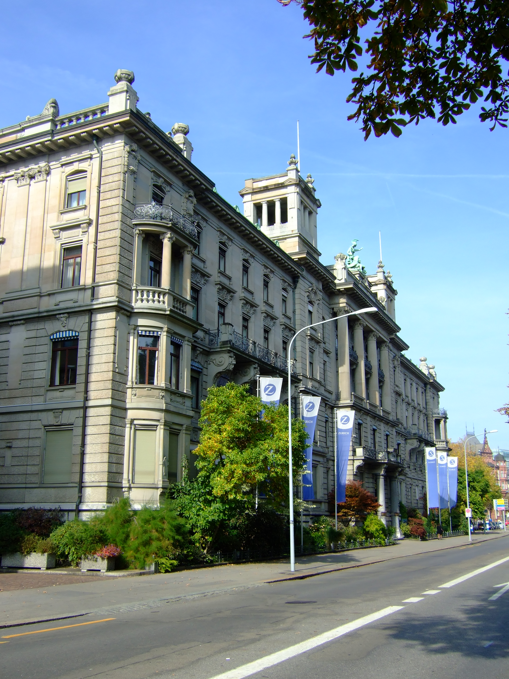 Hauptsitz der "Zurich Financial Services" («Zürich» Versicherungs-Gesellschaft) in Zürich am Mythen-Quai